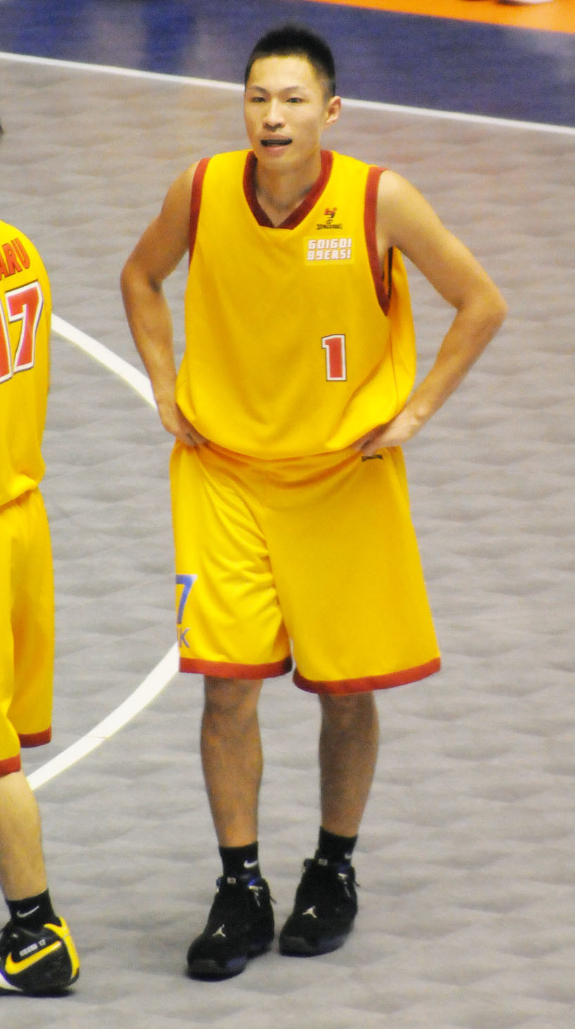 仙台89ERS、高橋憲一選手。秋田県立体育館で。